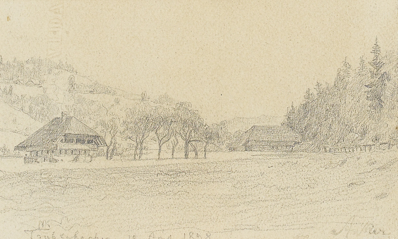 "Trubschachen". Bleistift auf Papier, betitelt und daiert 19. August 1898, 11 x 18,5 cm